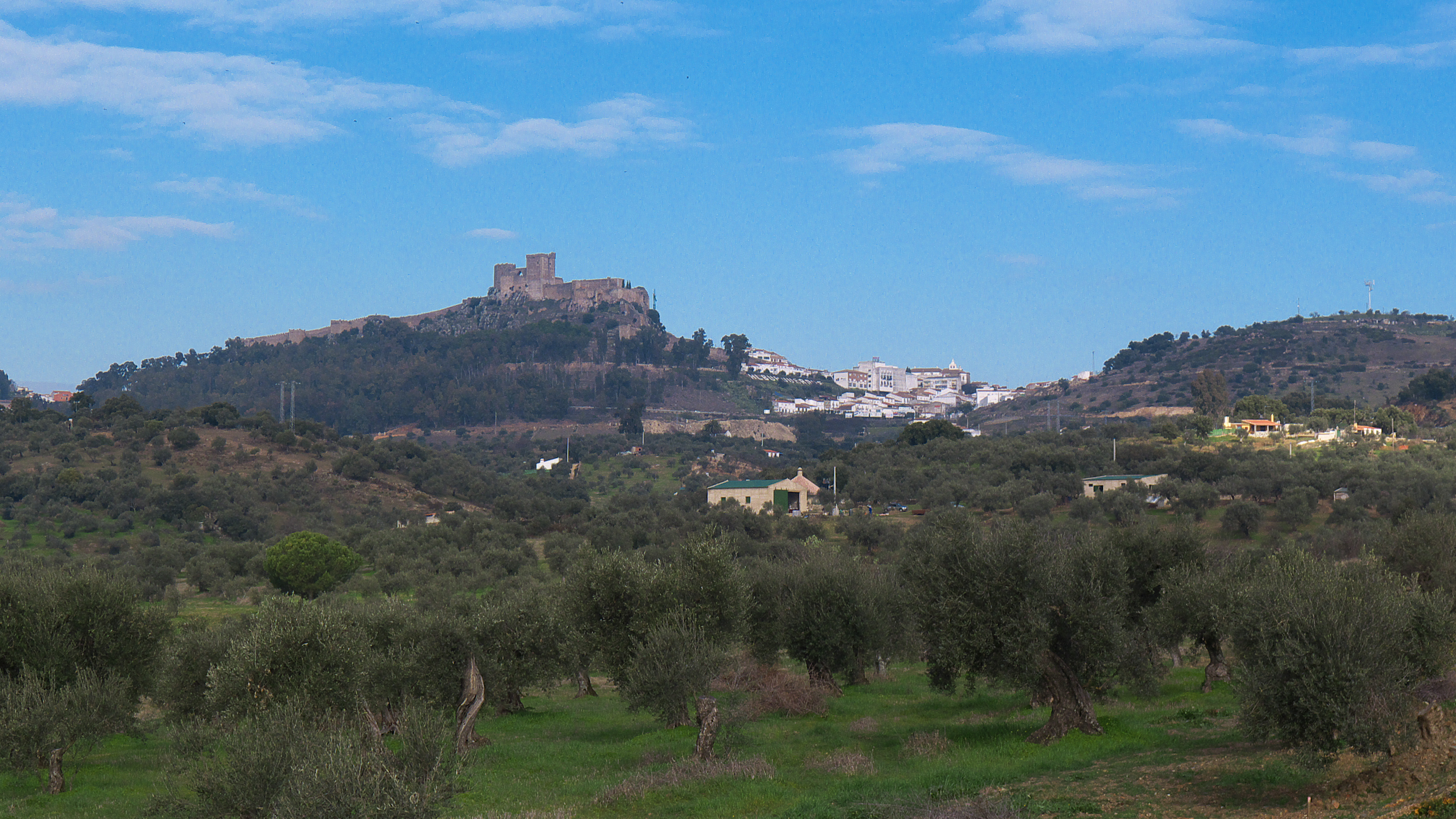 Entre los principales castillos extremeños.